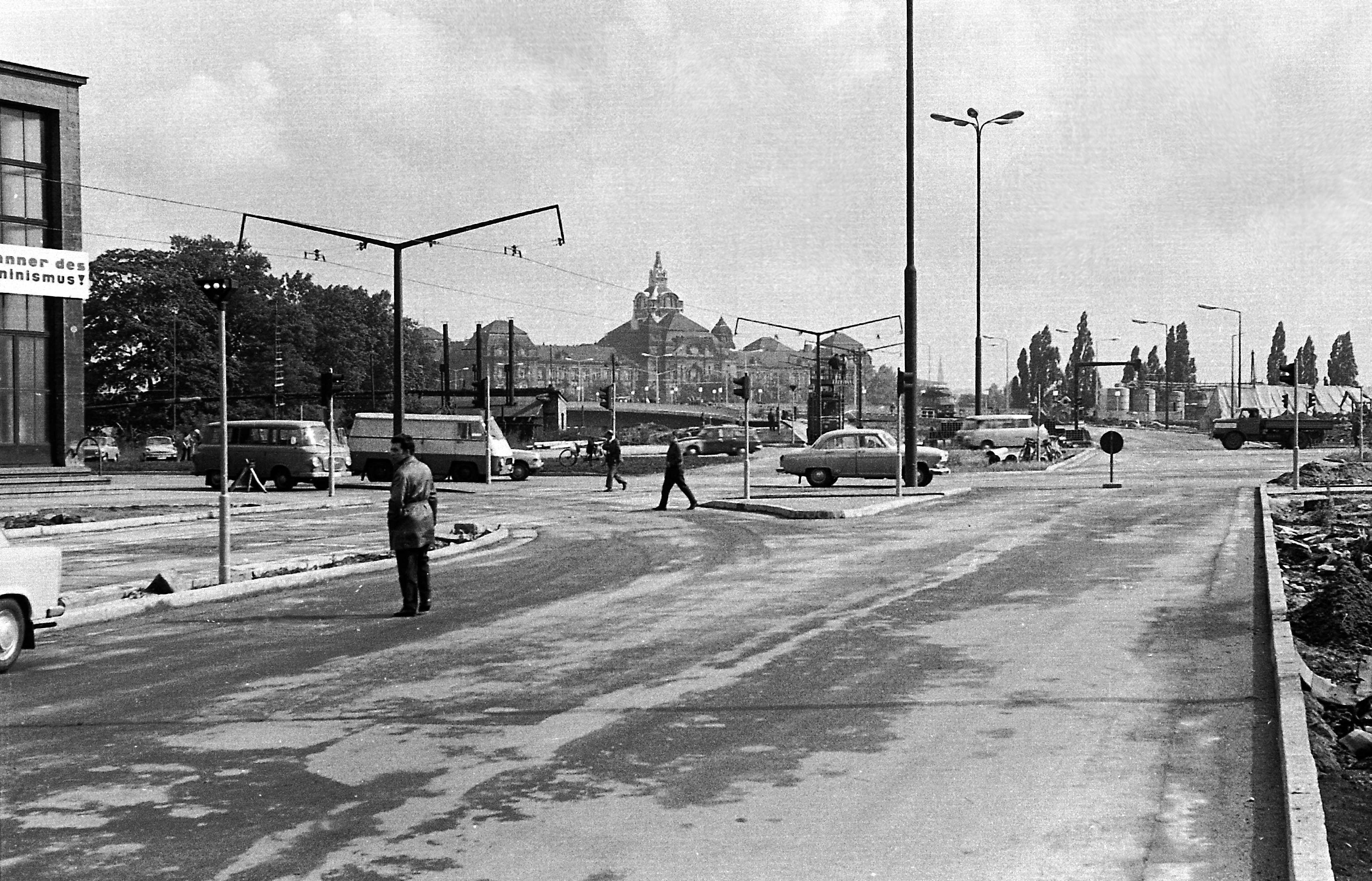 30.06.1971 Dresden: Die Dr.-Rudolf-Friedrichs-Brücke (Carolabrücke) über die Elbe (GMP: 51.054845,13.746963). Zustand kurz vor ihrer Freigabe für den Verkehr. Sicht von Süden aus der St. Petersburger Straße über den Rathenauplatz. Im Hintergrund das Gebäude des Rates des Bezirkes Dresden (Sächsische Staatskanzlei). [F19710623A013.JPG]19710630100NR.JPG(c)Blobelt